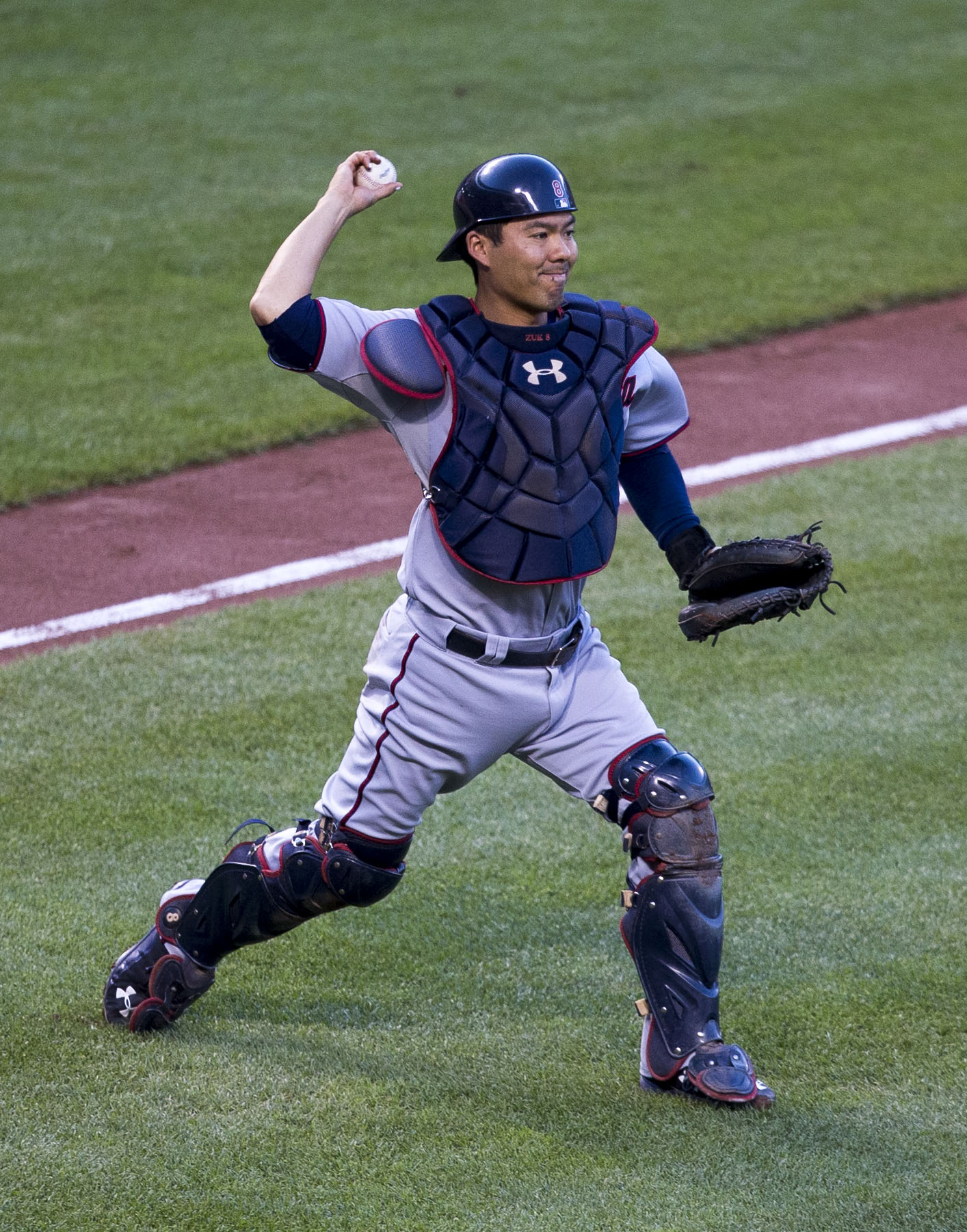 Kurt Suzuki